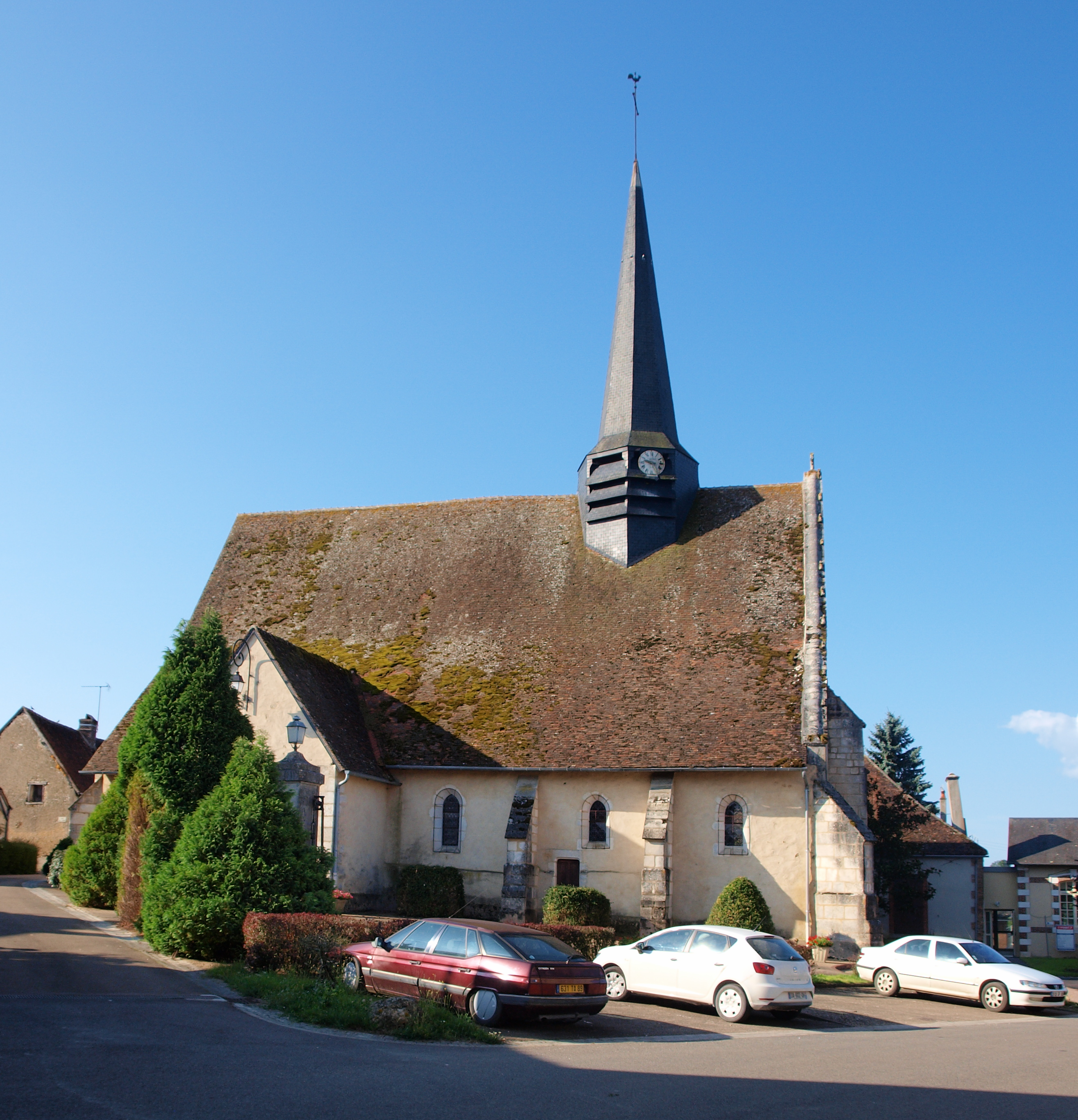 Saint-Martin-des-Champs (Yonne, France)